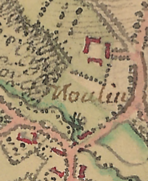 Afbeelding molen en hoeve